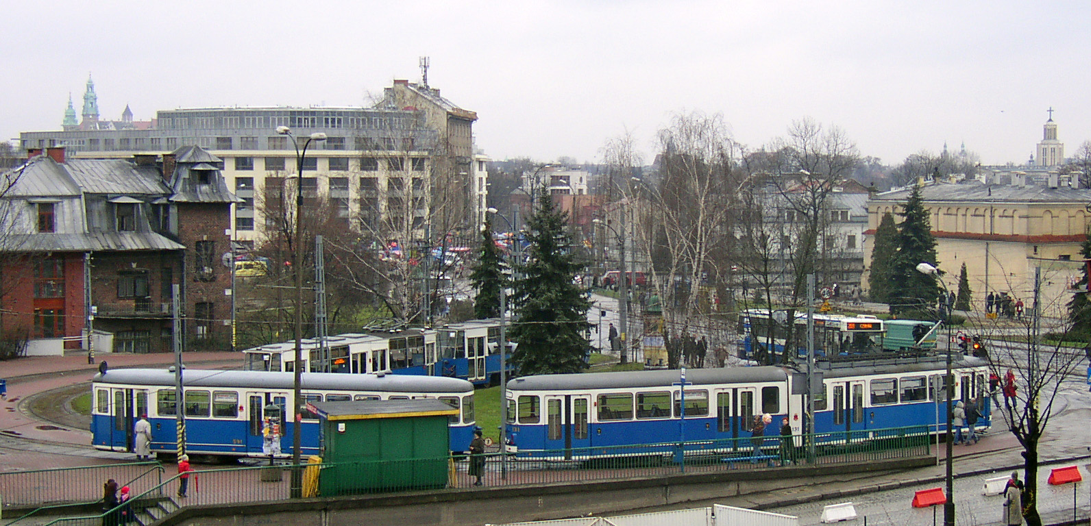 Kraków - Salwator - tram balloon loop